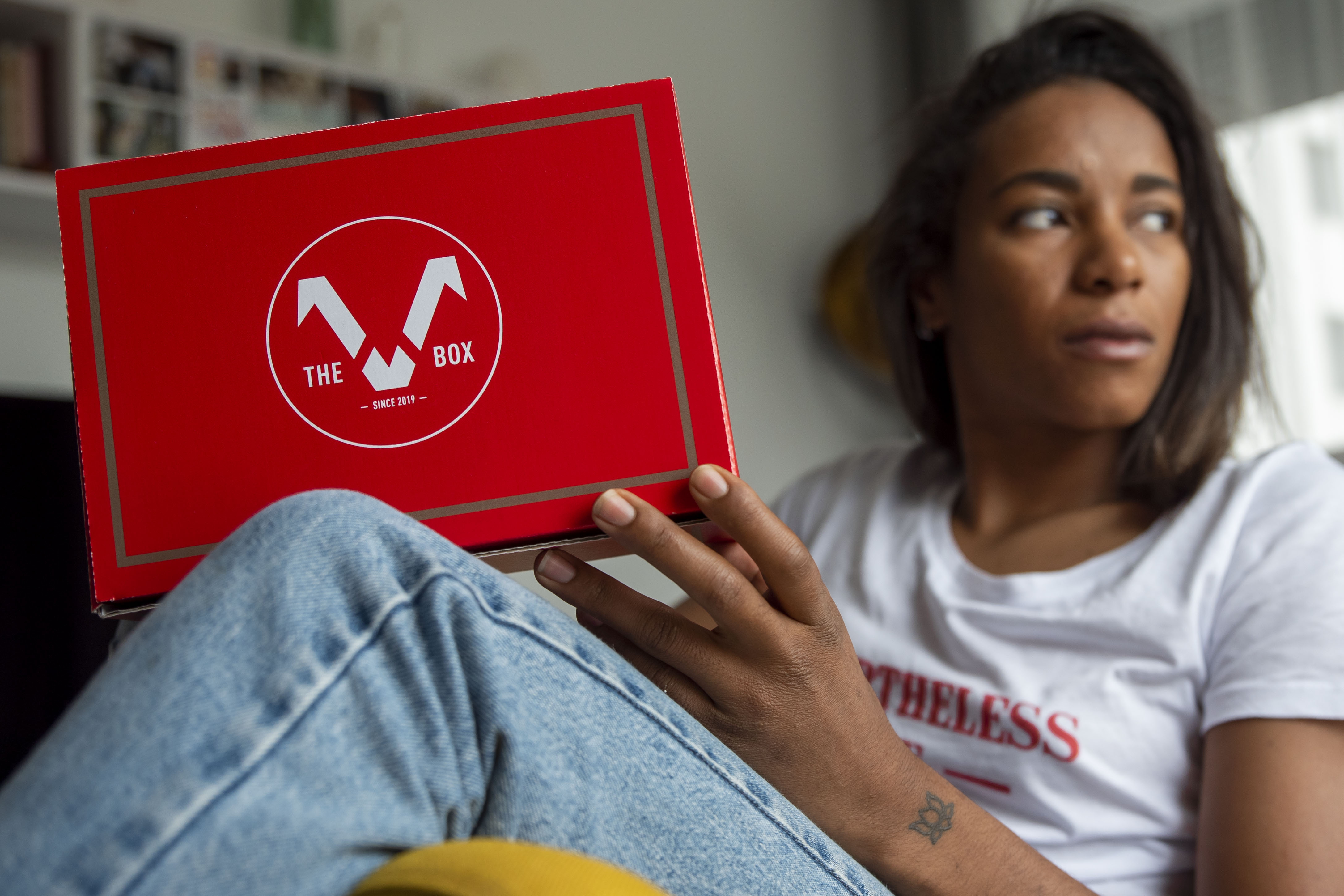 Estelle Nze Minko et son projet The V Box. Un coffret cadeau regroupant des créations 100% féminines